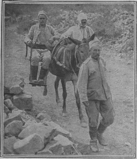 Transport de blessés Serbes en Cacolet sur le front de Macédoine, publié dans Le Pays de France du 26 octobre 1916.